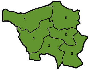 Map of Saarland